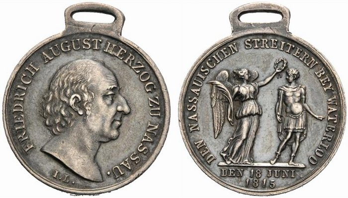 Waterloomedaille Herzogtum Nassau